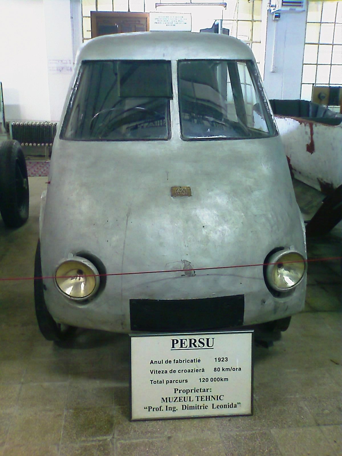 Das Perșu Stromlinien Auto im Muzeul National Tehnic Prof. ing. Dimitrie Leonida in Bukarest.